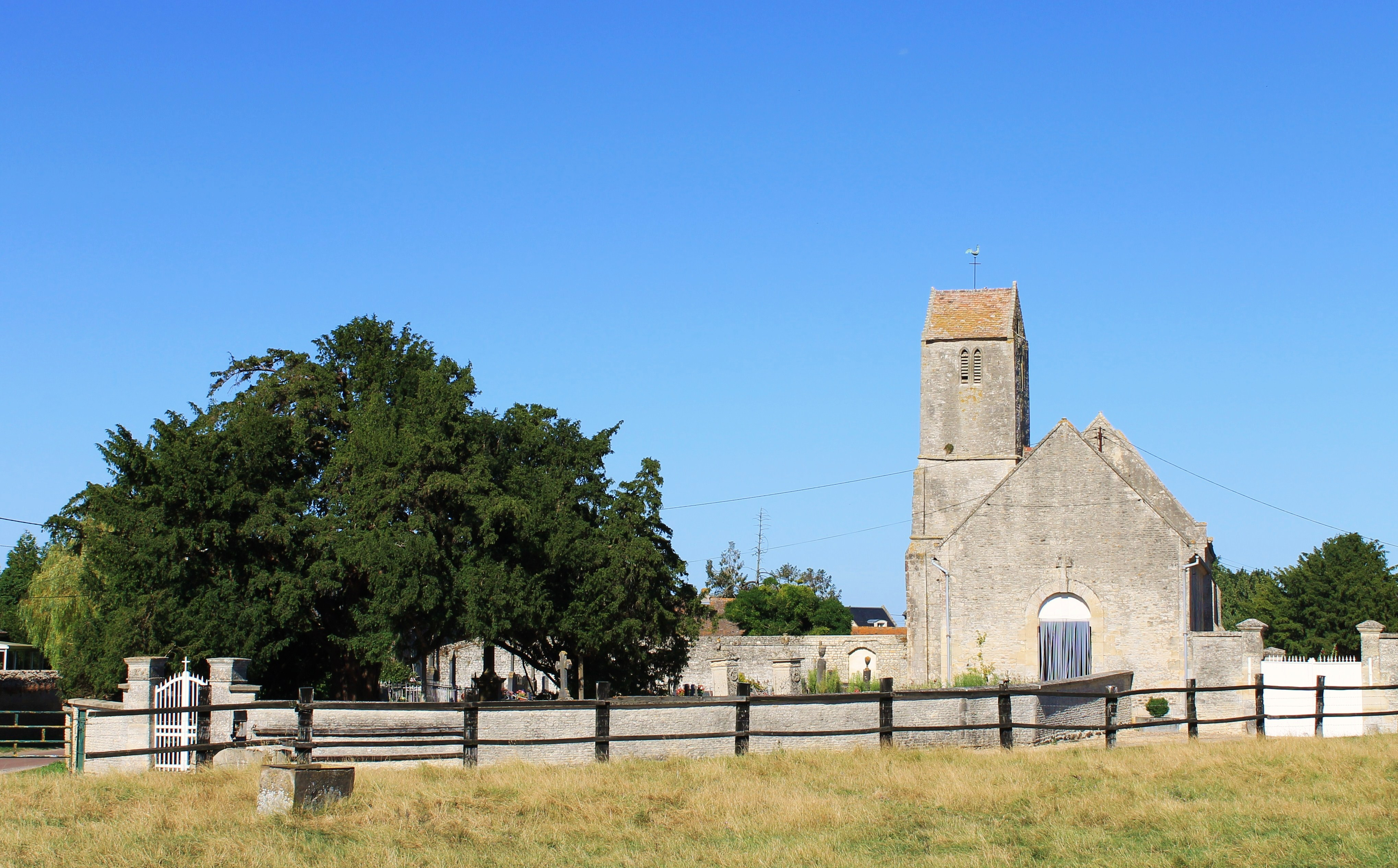 Eglise Saint-Vaast et if centenaire du cimetière à Poussy-la-Pampagne (Calvados)